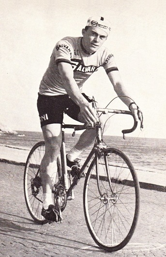 Mario Minieri